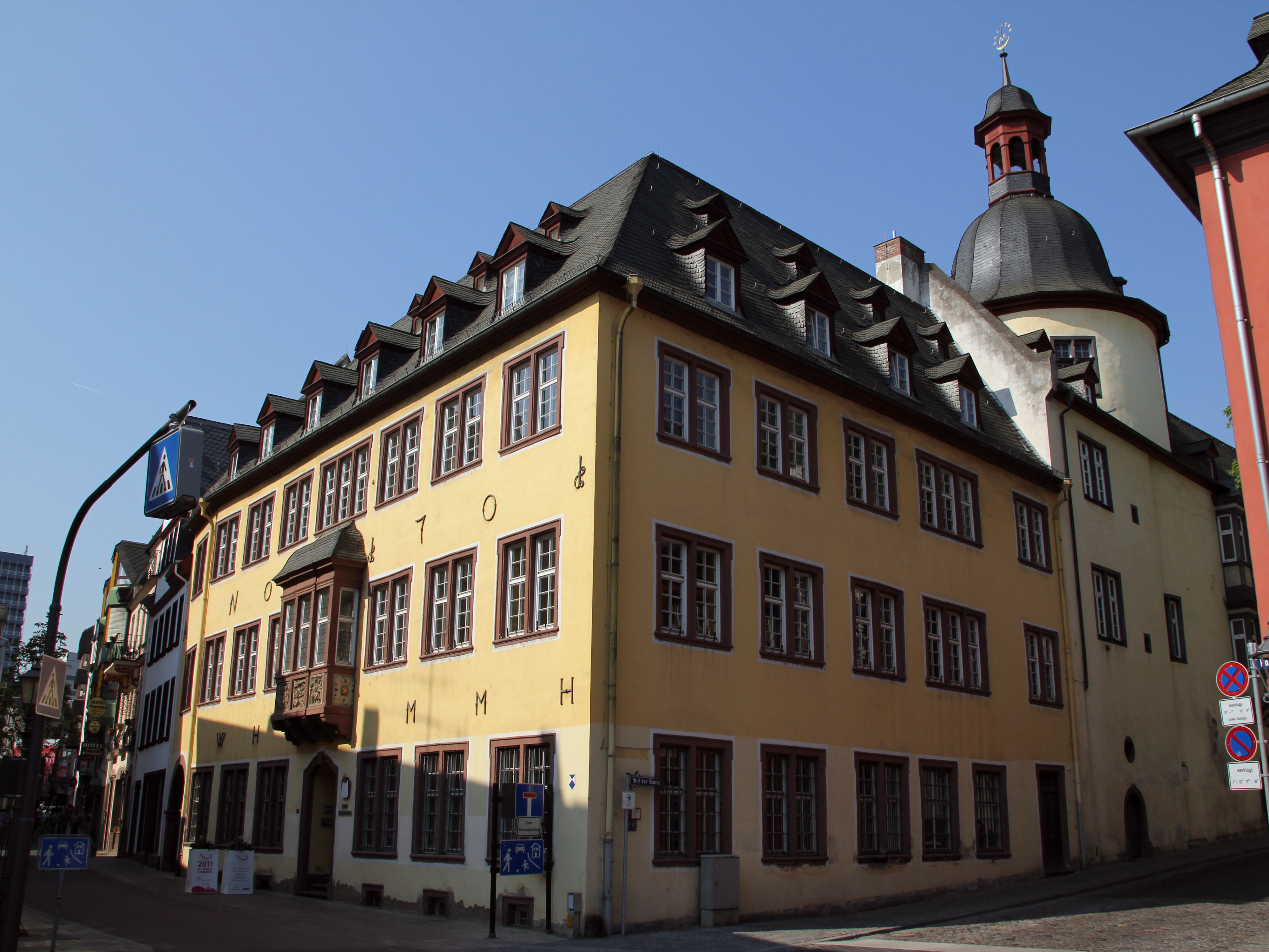 Koblenz im Buga-Jahr 2011 - Das Dreikönigenhaus in der Altstadt